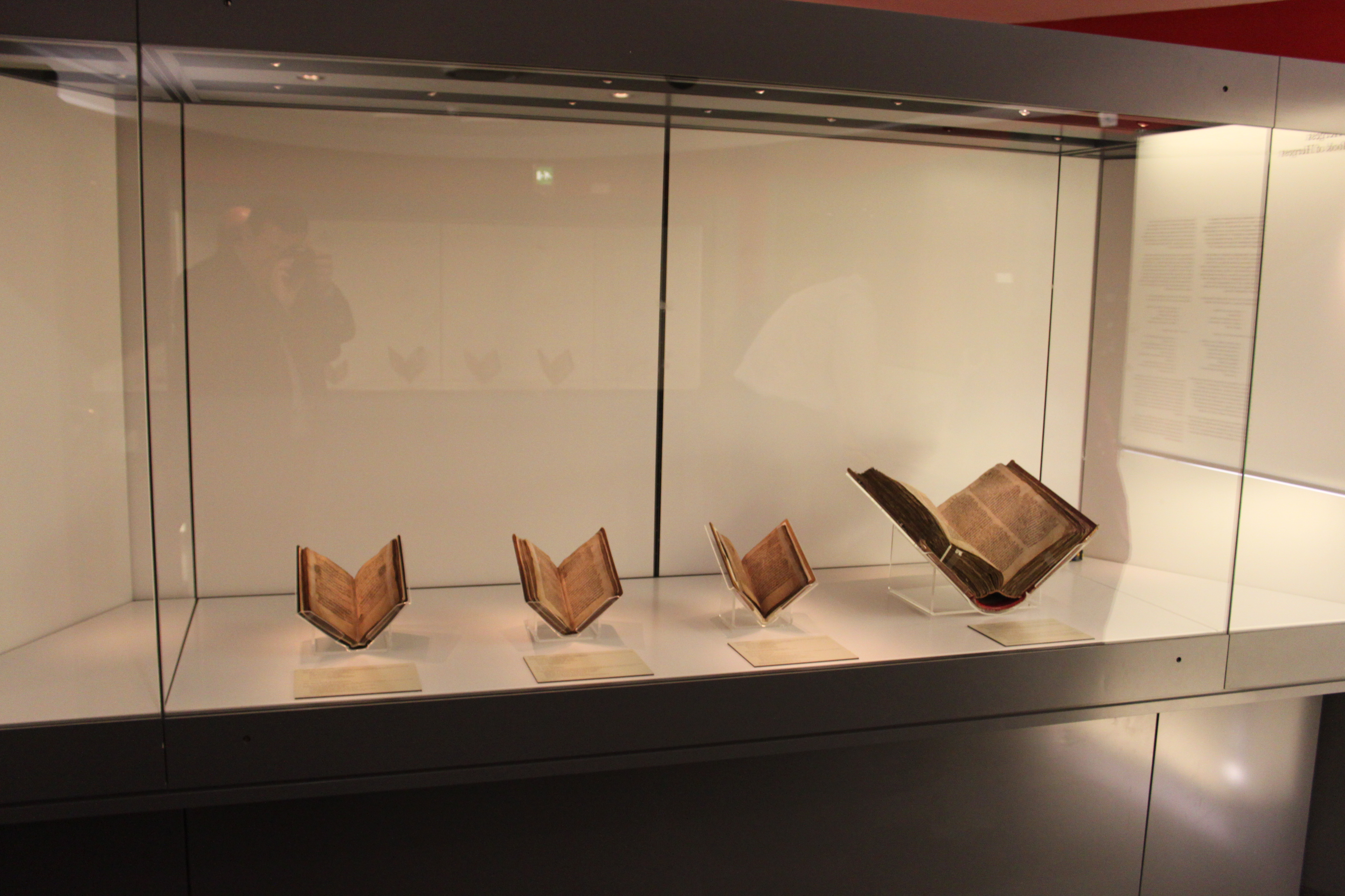 The Presiding Officer of the National Assembly for Wales visited the National Library of Wales to see William Forbes Skene's "4 Books : Welsh Icons United" exhibition. @assemblywales / Ymwelodd Llywydd Cynulliad Cenedlaethol Cymru â Llyfrgell Genedlaethol Cymru i weld arddangosfa William Forbes Skene "4 Llyfr: Eiconau Cymraeg Ynghyd". @cynulliadcymru